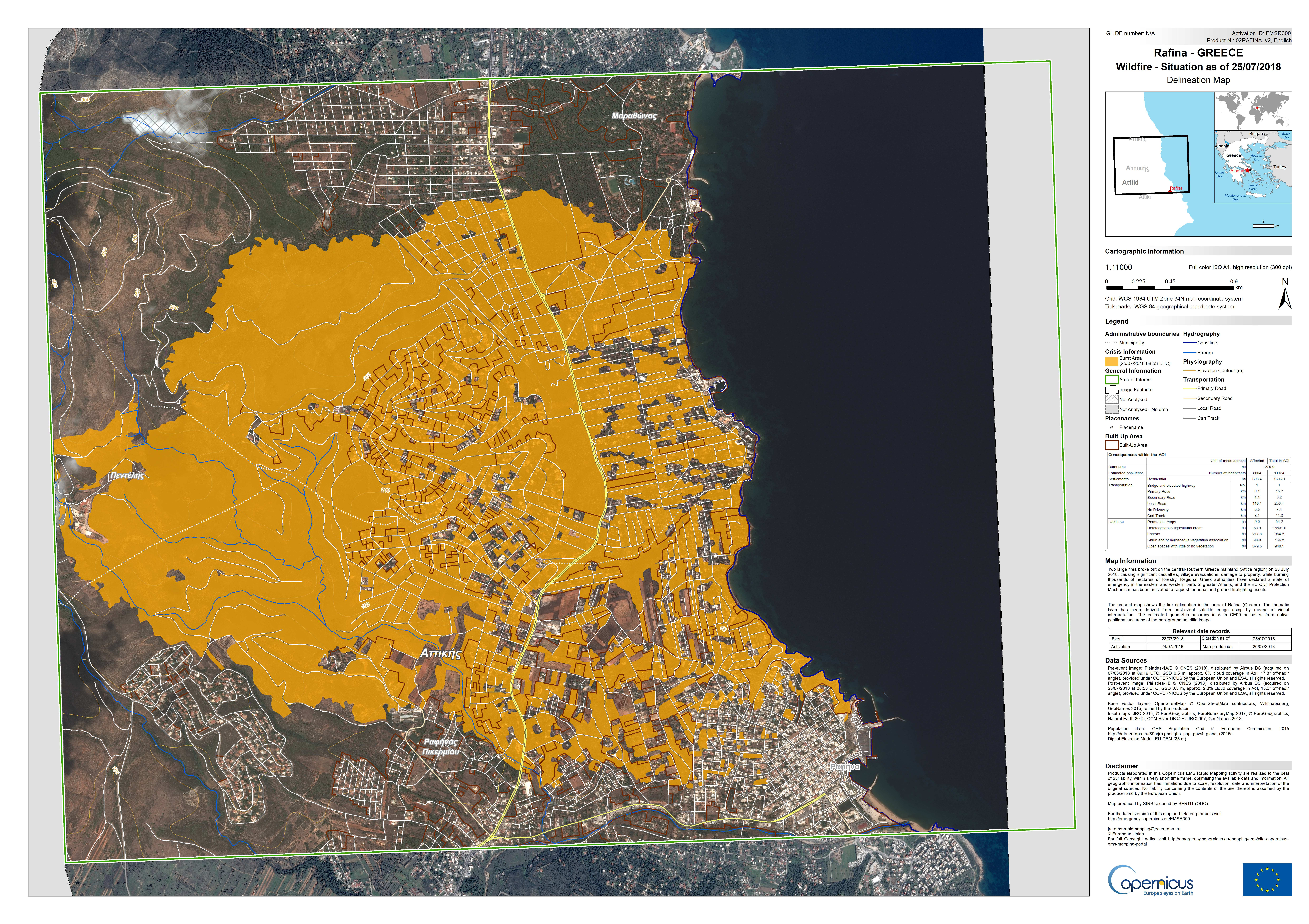 Έκταση πυρκαγιάς στο Νέο Βουντζά, Μάτι, και Ραφήνα που ξεκίνησε στις 23 Ιουλίου 2018. Δορυφορική εικόνα από το δορυφόρο Sentinel-2 επεξεργασμένη από το Copernicus Emergency Management Service, στις 23 Ιουλίου 2018.